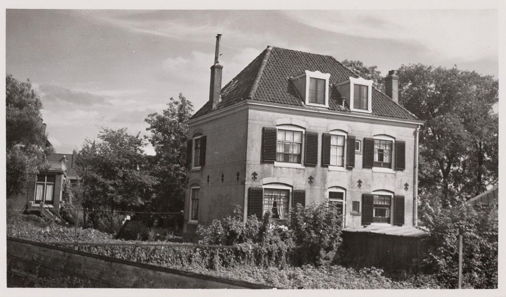 Beschrijving Sloterdijkermeerweg 6 Achterzijde hofstede "Meer en Vaart" Documenttype foto Vervaardiger Eck, J. van (Jacobus, 1873-1946) Collectie Collectie J. van Eck: foto's Datering 25 juli 1939 Geografische naam Sloterdijkermeerweg Inventarissen Afbeeldingsbestand A01634000965 Generated with Dememorixer